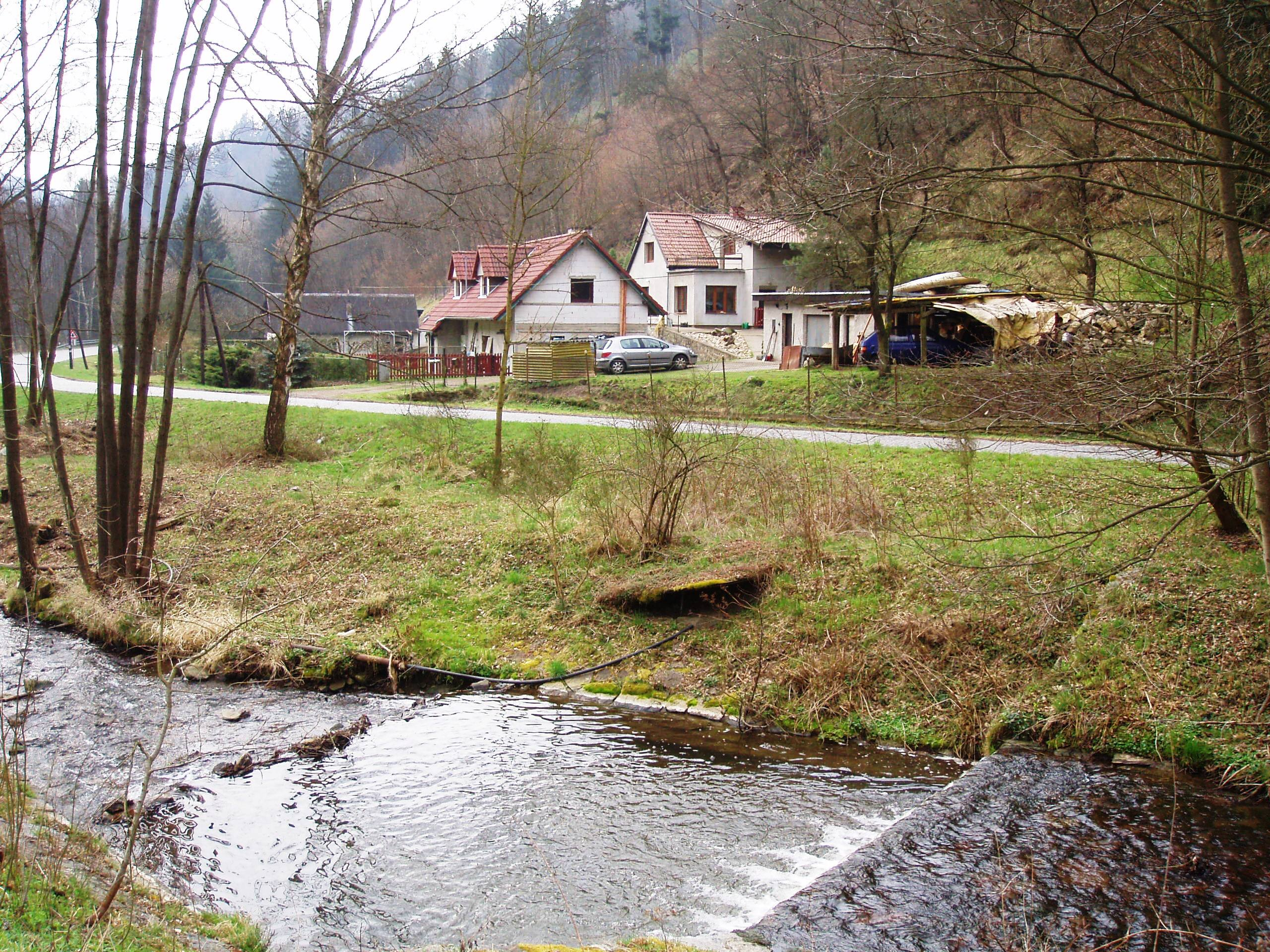 osada Dolní Líšnice